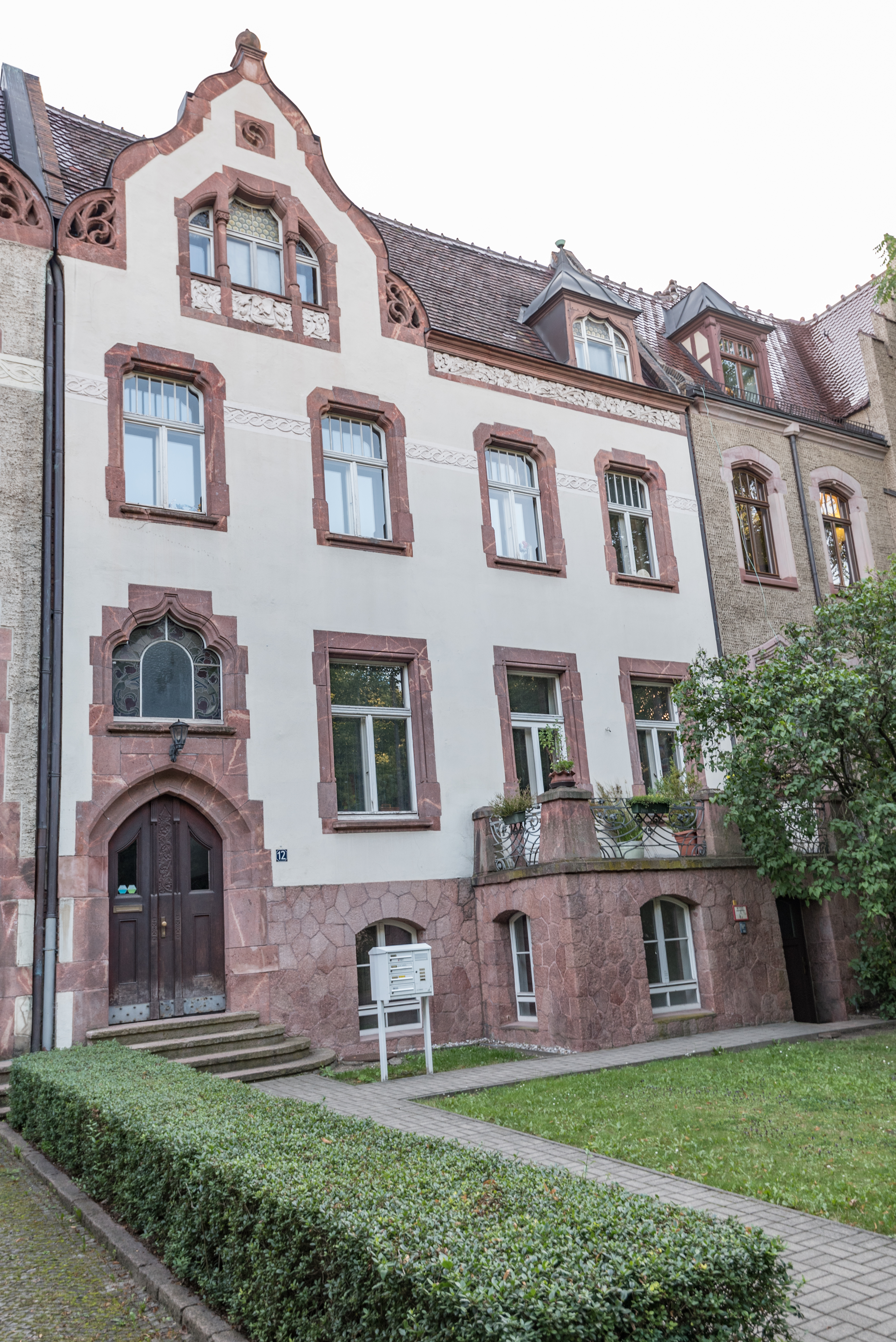 Halle (Saale), Robert-Franz-Ring 12